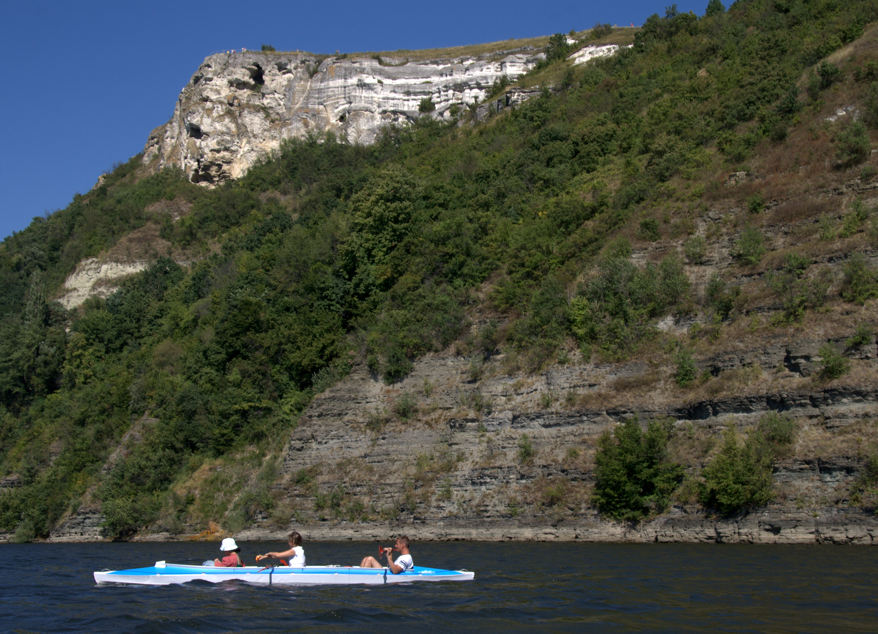 Скеля Бакоти